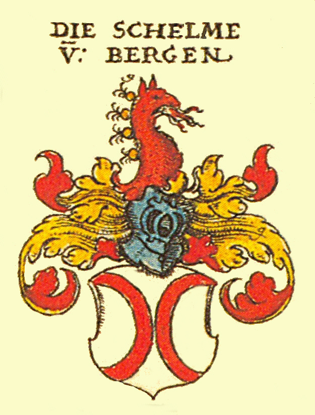 Wappen der Rheinländischen Adelsfamilie Schelm von Bergen